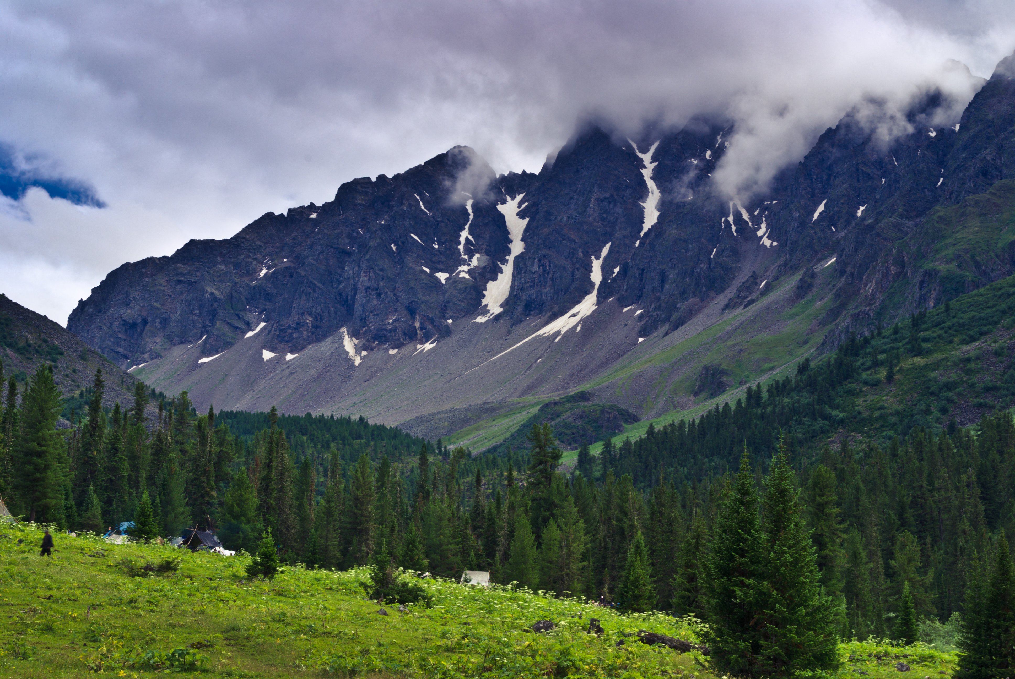 Аржаан Чойган: Тоджинский кожуун, Тува This image is related to the protected area of Russia number 1710046